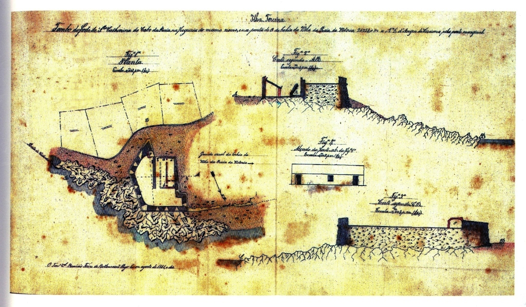 "Tombo do forte de Sta. Catharina do Cabo da Praia...", Ilha Terceira (Açores), Portugal.